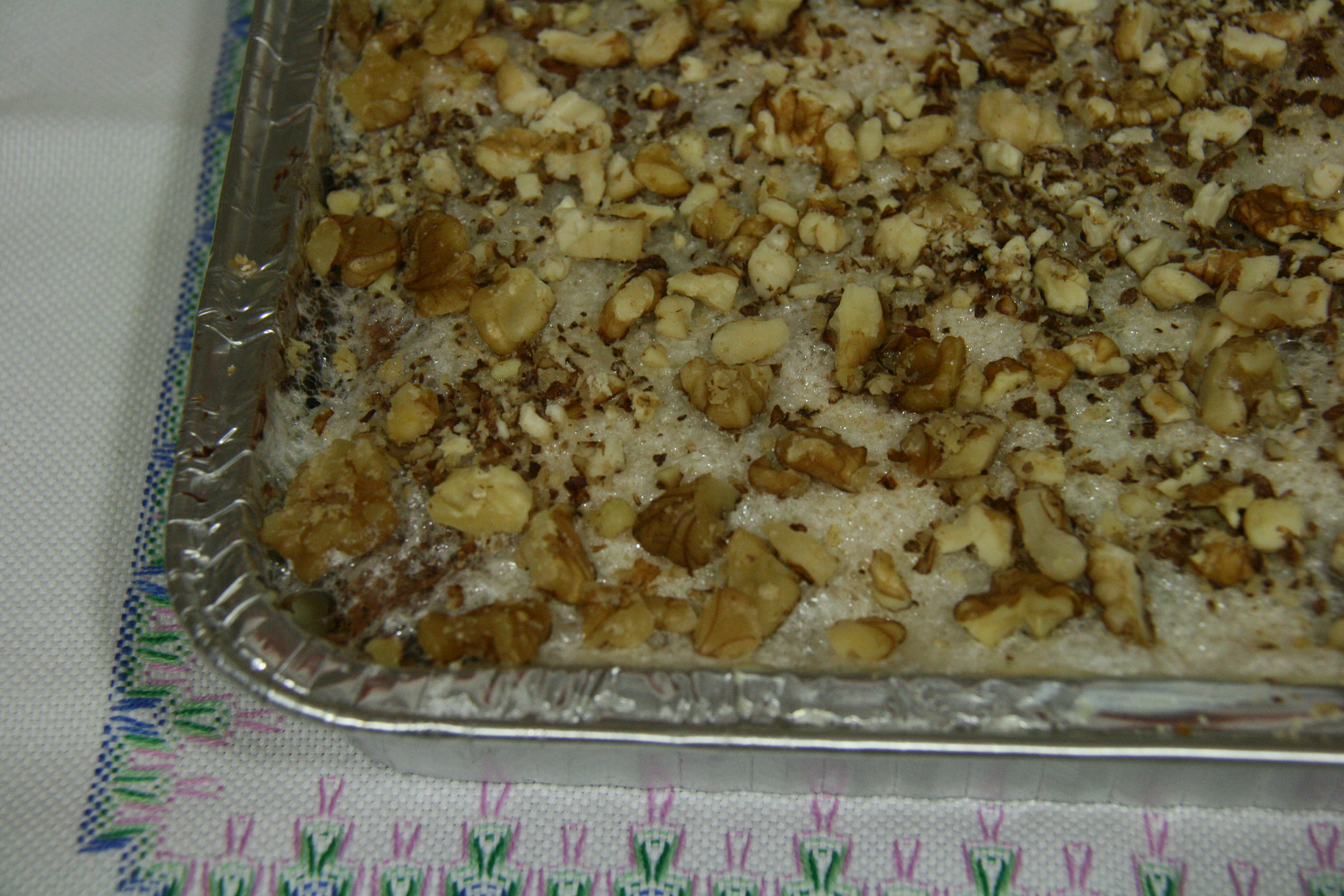 Pave